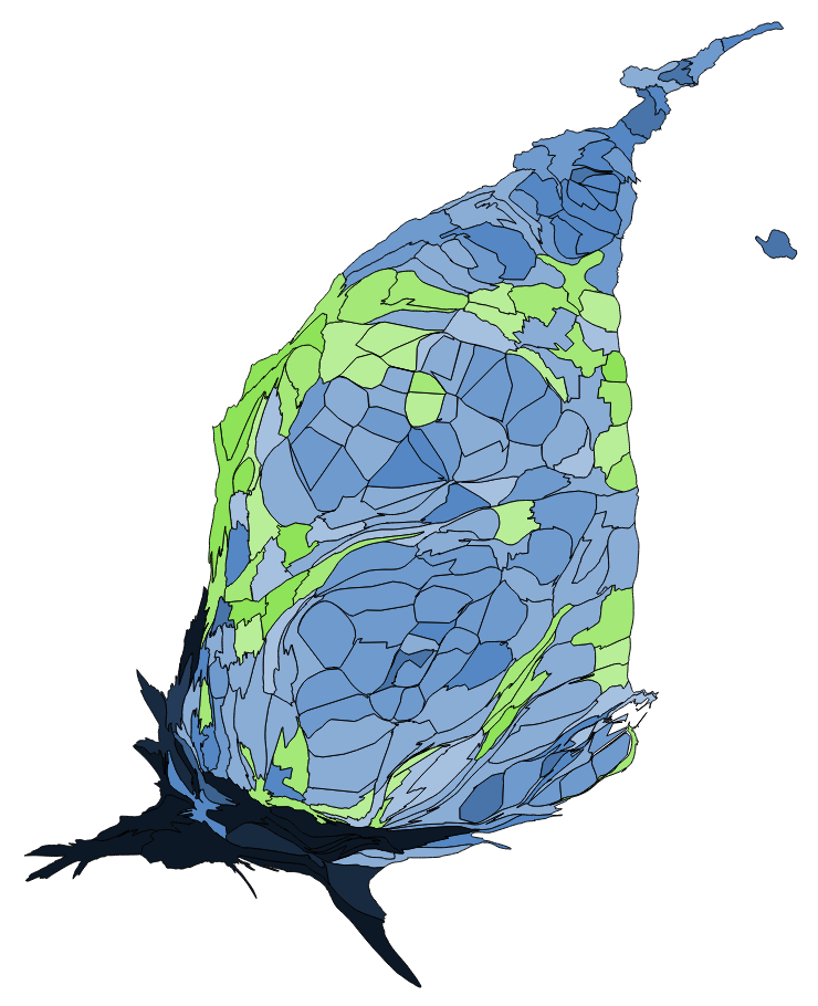 顏色對照表